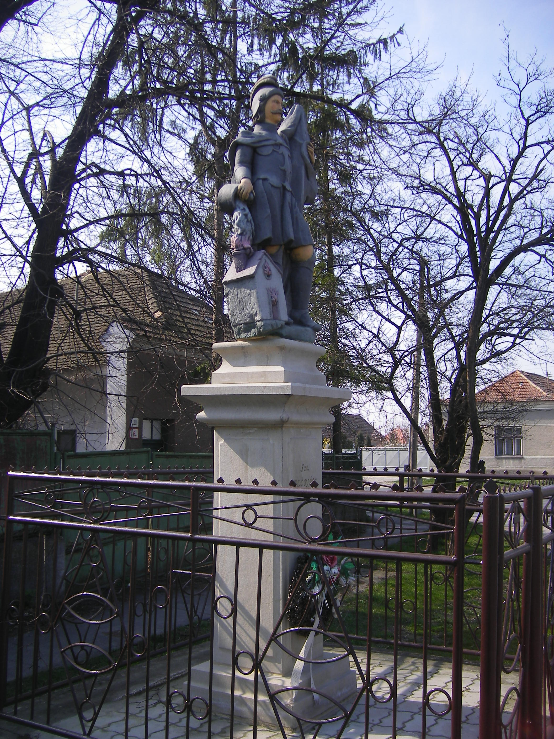 Ekecs, Szt. Flórián szobra